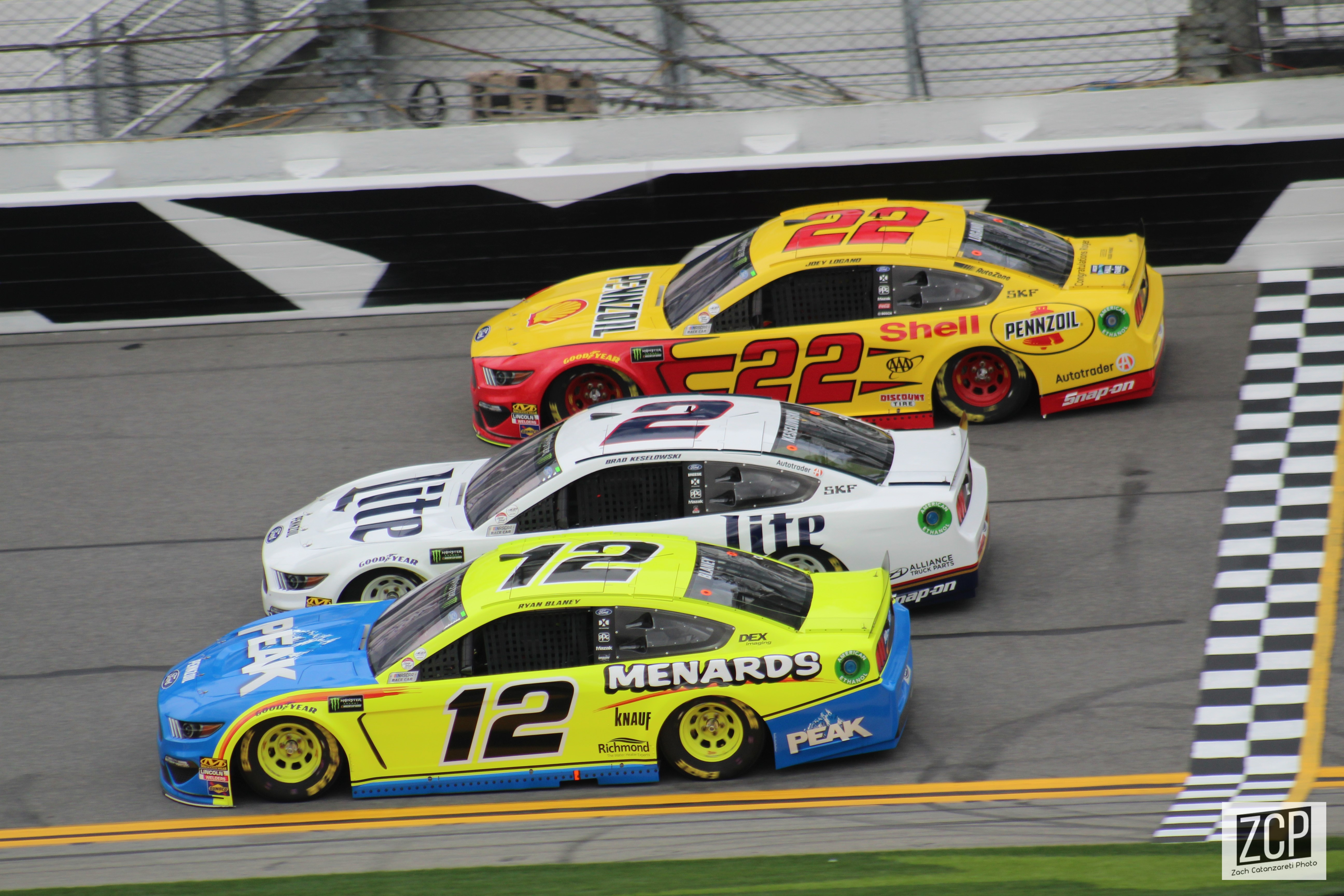 2019 Daytona 500